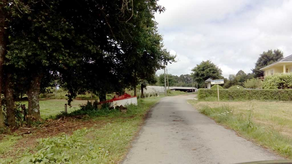 Vista de Centeás, Curtis.